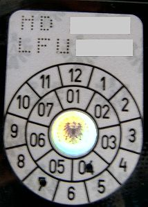 Begutachtungsplakette